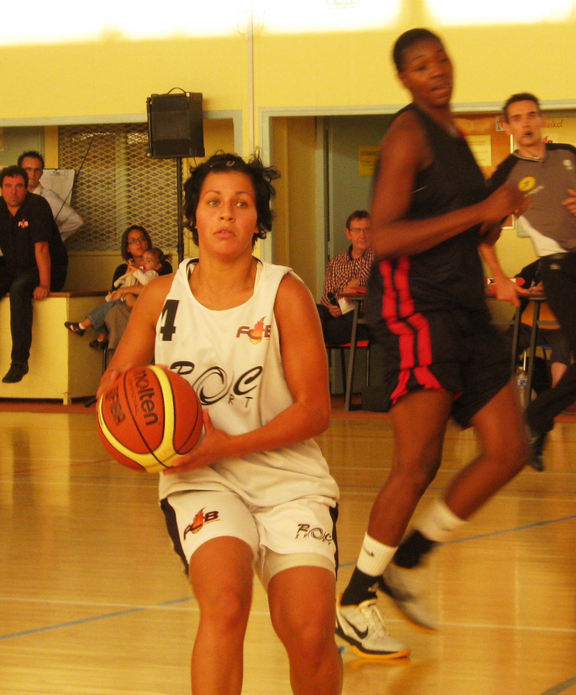 Amel Bouderra (Flammes Carolo Basket) en match amical contre Mondeville.